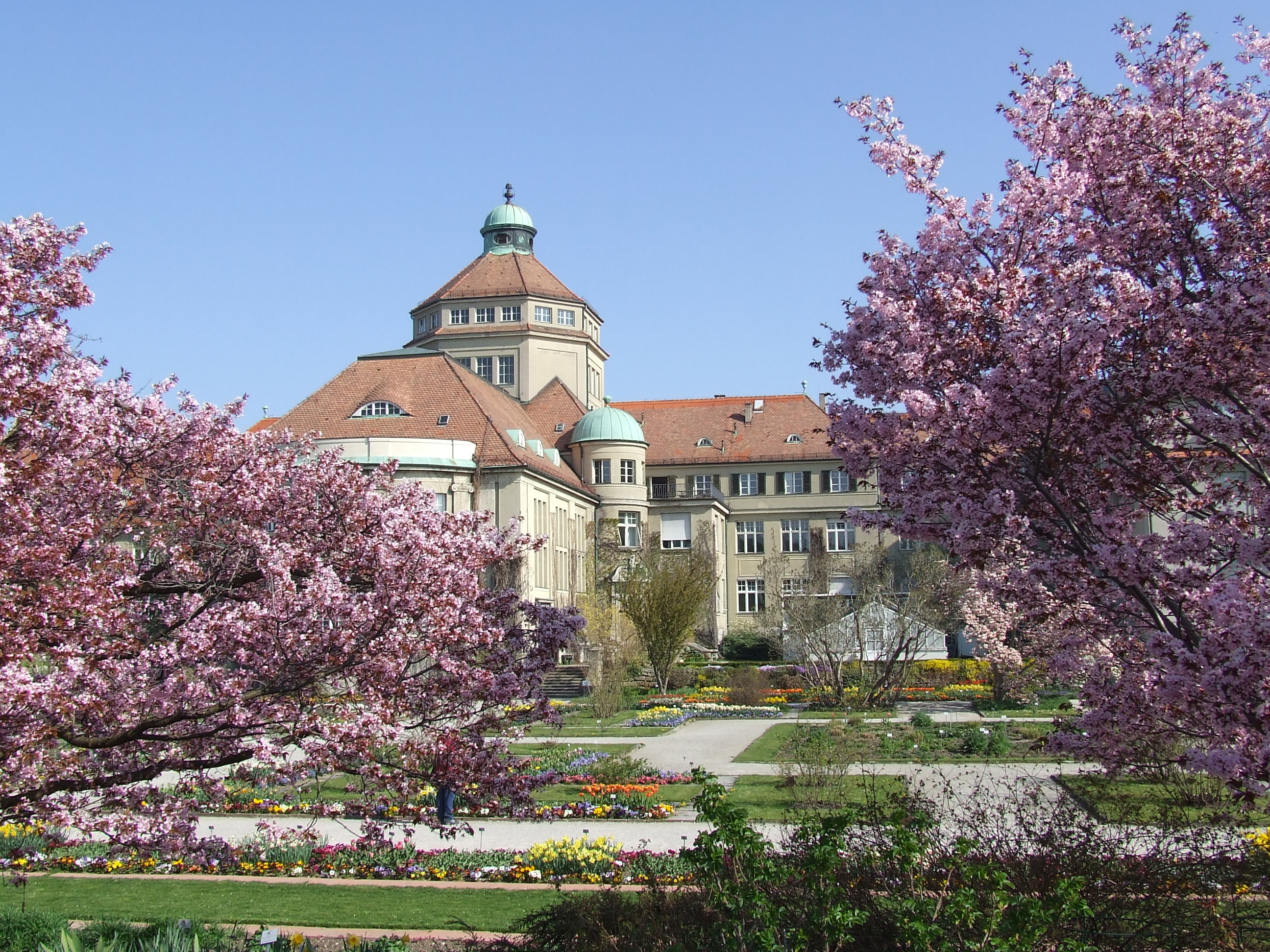 Schmuckhof Botanischer Garten in München im Frühjahr